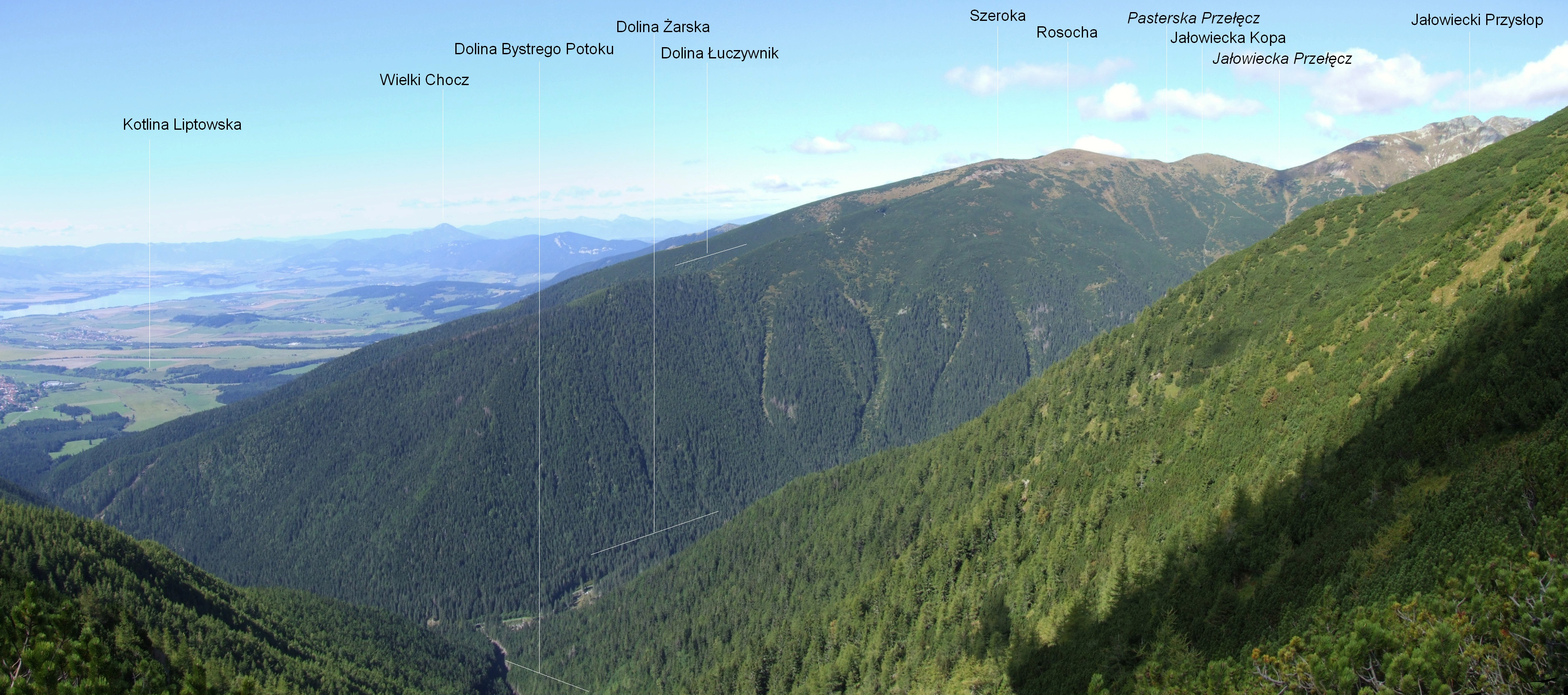 Widok z podejścia na Baraniec